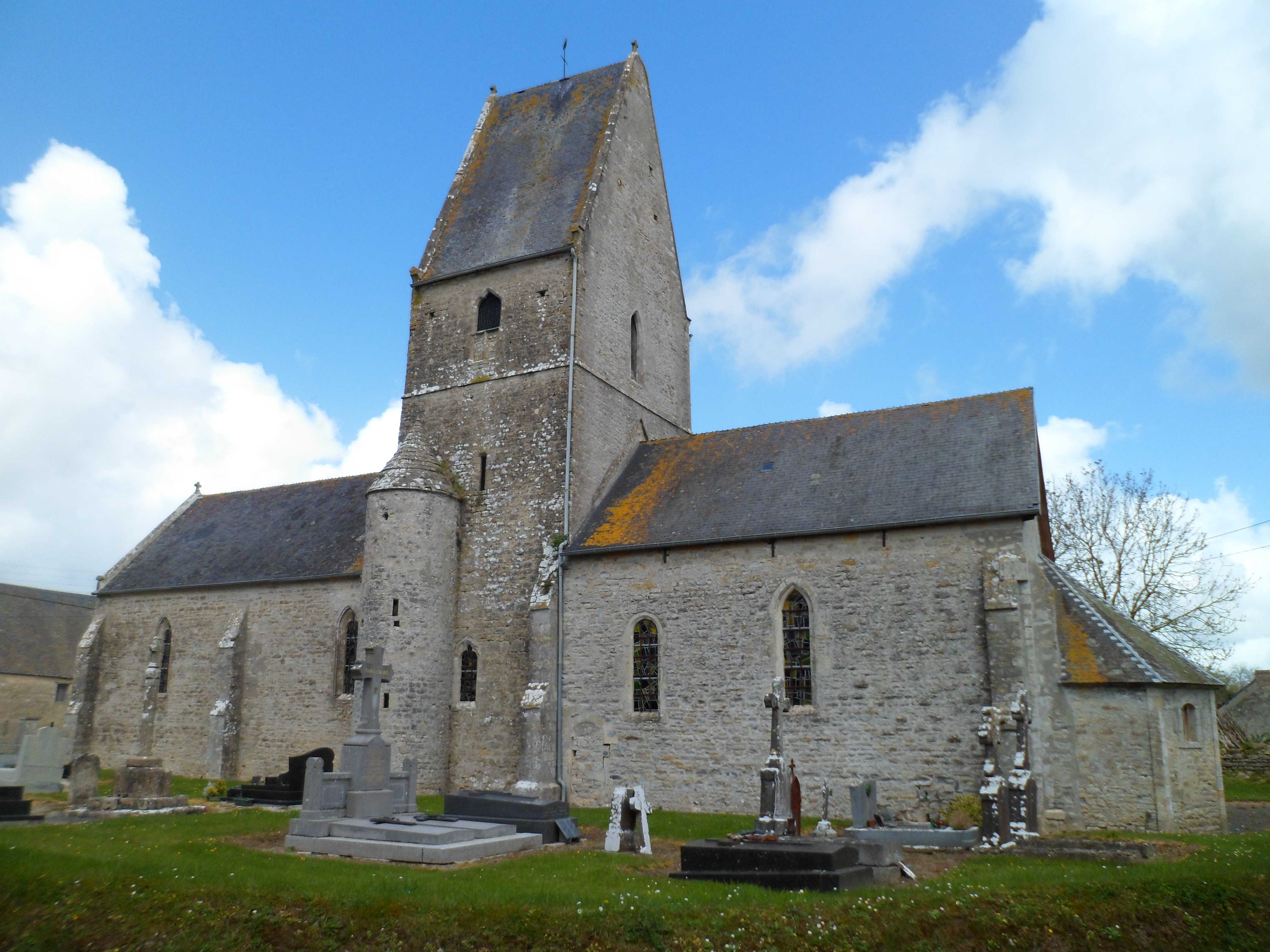 Église Saint-Éloi de Vierville